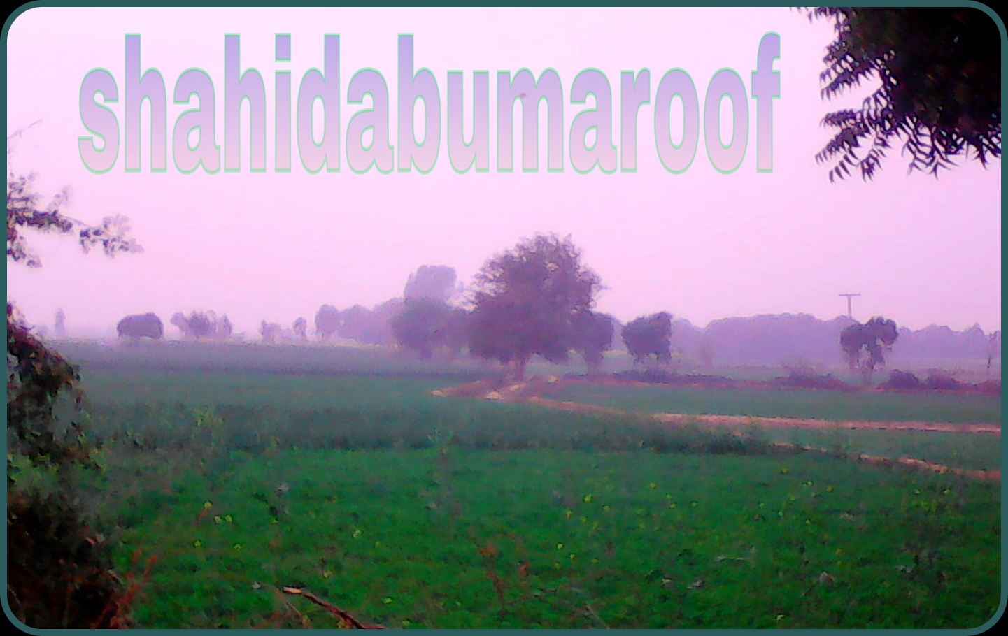 Аҧсшәа: Missan Wadi